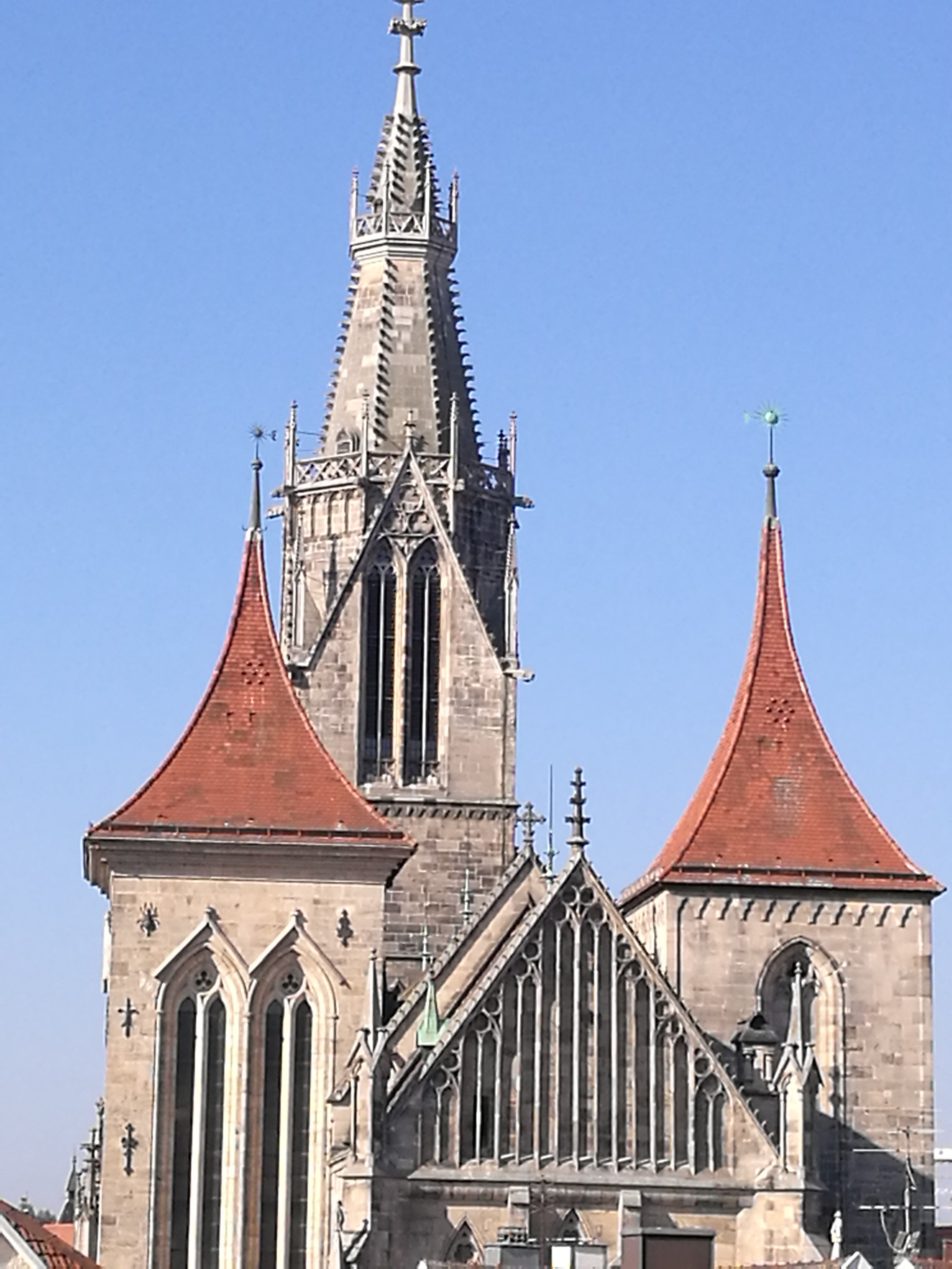 Das Bild zeigt die um 1250 begonnene Chorseite. Die Türme zu seiten des Vorchores enthalten die ältesten Bauteile. Die filigran mit Maßwerk geschmückte Giebelwand stammt aus der zweiten Bauphase um 1290. Gut zu sehen sind die unterschiedlichen Turmabschlüsse.